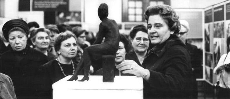 Zentralbild Reiche 6.3.1967 Berlin: Ausstellung "20 Jahre DFD" im Museum für Deutsche Geschichte eröffnet. Hanna Blecha (rechts), Mitglied des Sekretariats des Bundesvorstandes des DFD, führte die Gäste durch die Ausstellung "20 Jahre DFD - 20 Jahre Kampf für den Frieden, Demokratie und Sozialismus", die am 6.3.1967 im Museum für Deutsche Geschichte von Wilhelmine Schirmer-Pröscher, Stellvertretende Vorsitzende des Bundesvorstandes des DFD (im Hintergrund rechts) eröffent wurde. Hier die ersten Ausstellungsbesucher, unter ihnen Frau Lilly Becher, links, an der Plastik "Junge Frau 1967" von Gerhard Thieme.